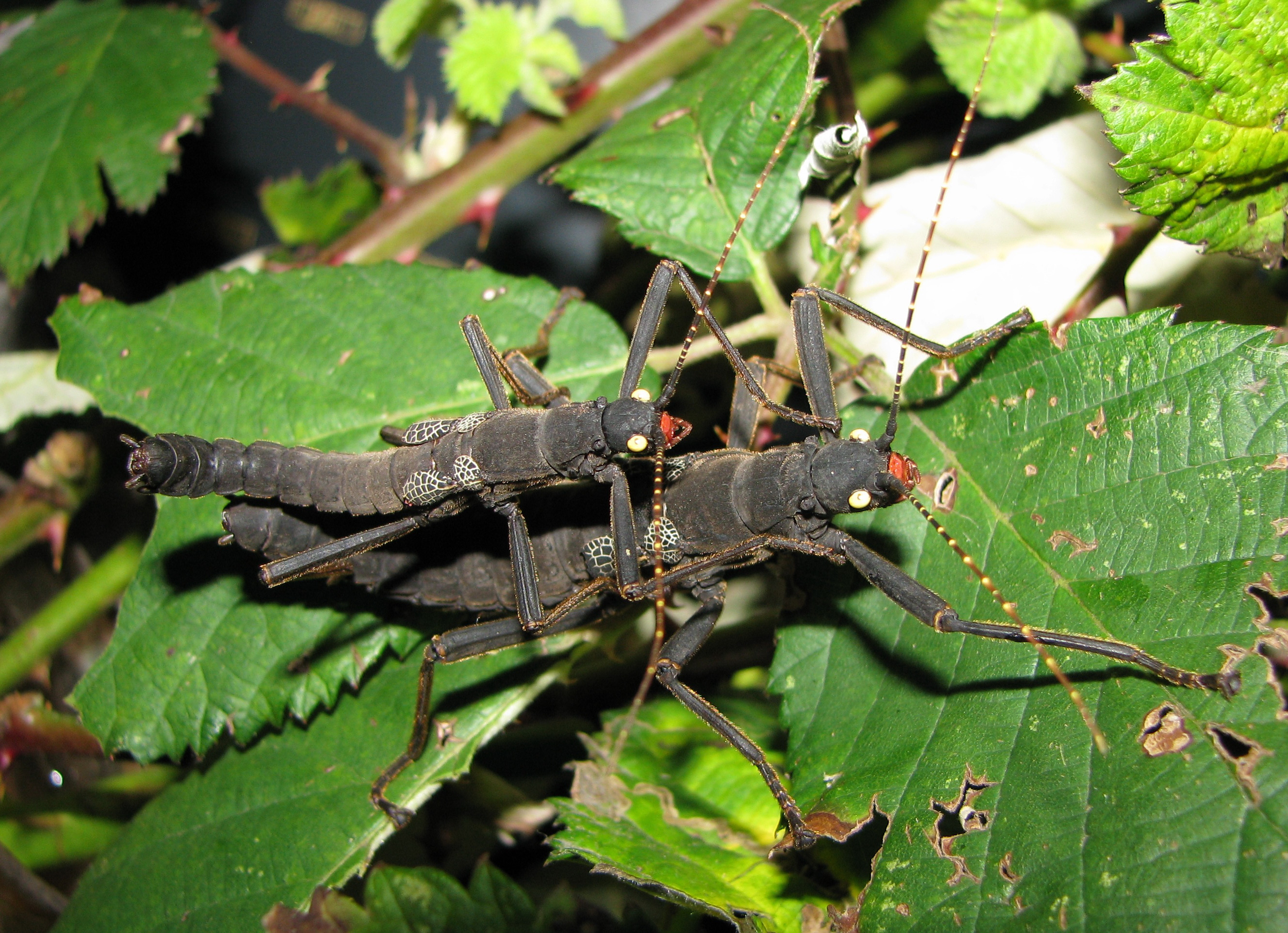 Pair of Peruphasma schultei de. Samtschrecke oder peru-Stabschrecke